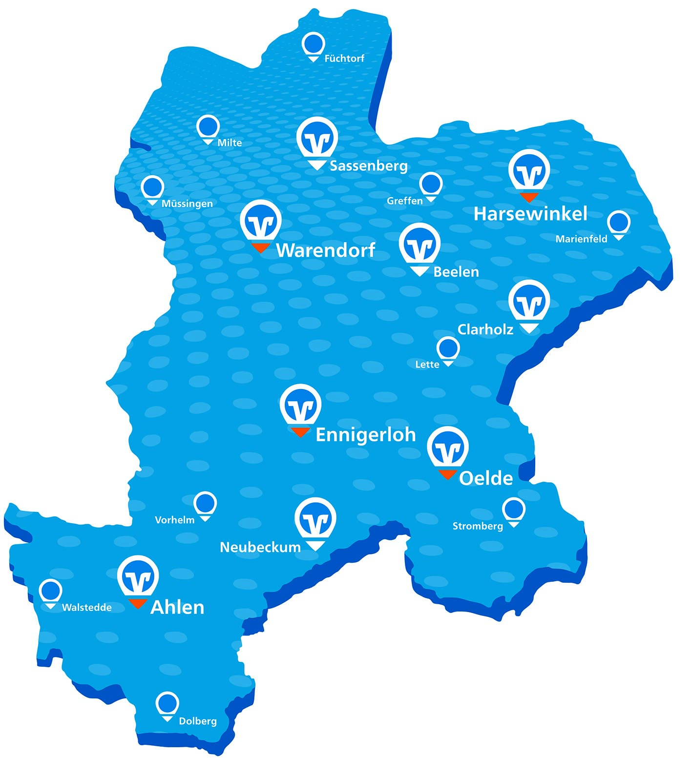 Die Gebietskarte zeigt das Geschäftsgebiet der Volksbank eG mit den Geschäftsstellen.